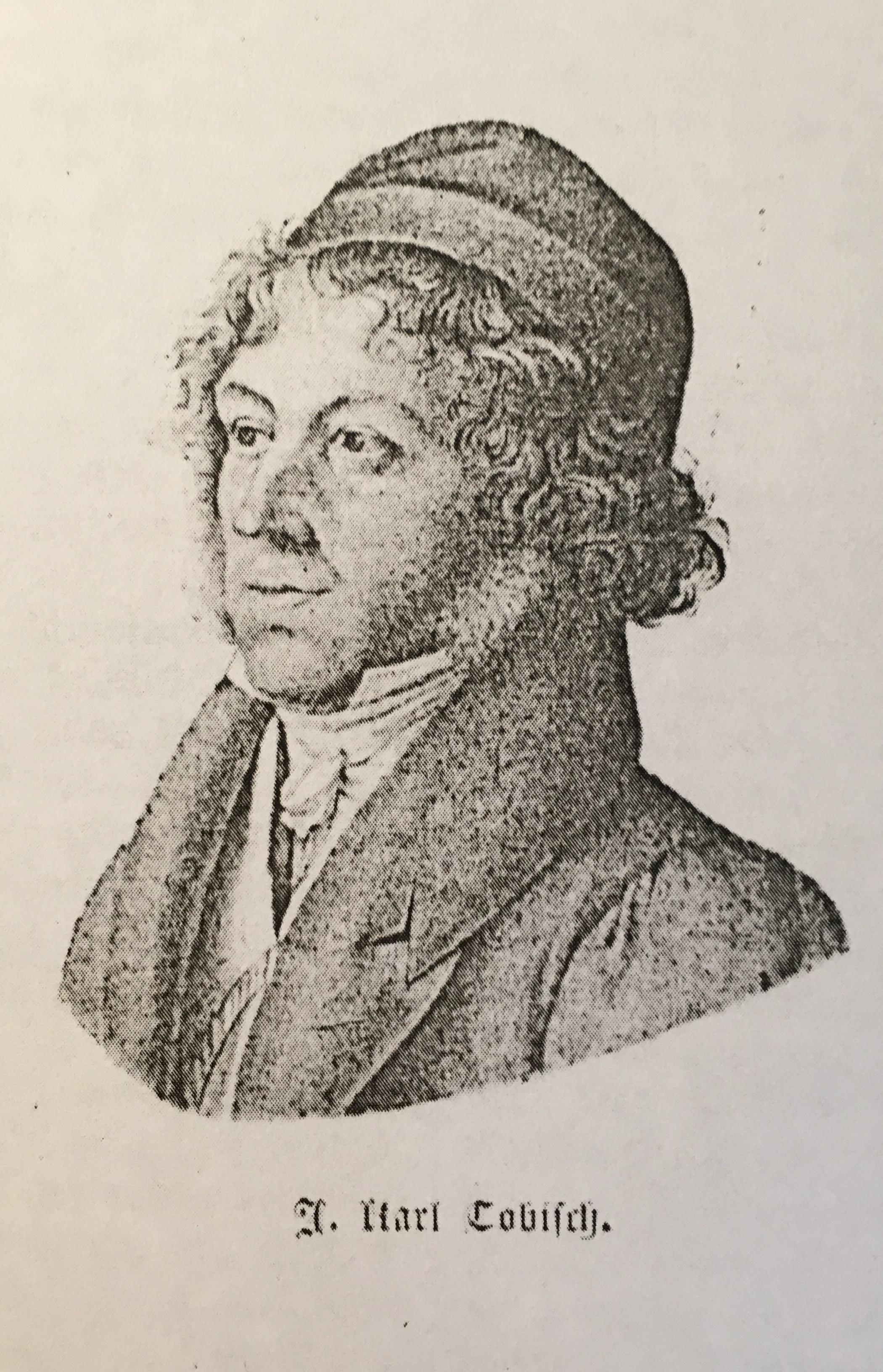 Portrait Johann Karl Tobisch (1793–1855), Professor in Breslau